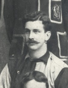 SC Germania, Football Club, São Paulo, Brazil, ca. 1904